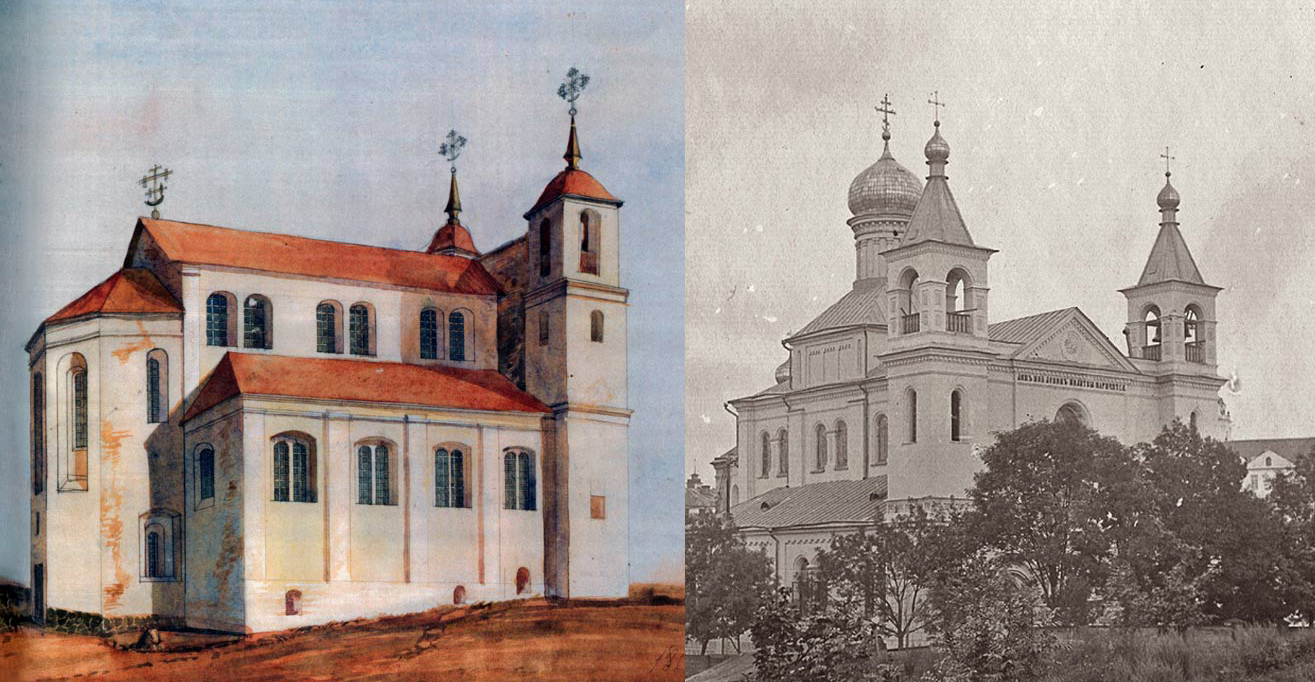 Беларуская (тарашкевіца): Маскалізацыя (русіфікацыя) Вялікага Княства Літоўскага. Места Менск. Царква Сьвятых Апосталаў Пятра і Паўла, помнік архітэктуры раньняга барока XVII стагодзьдзя: аўтэнтычны выгляд (налева) і па частковым руйнаньні ў выніку маскоўскай перабудовы (направа)